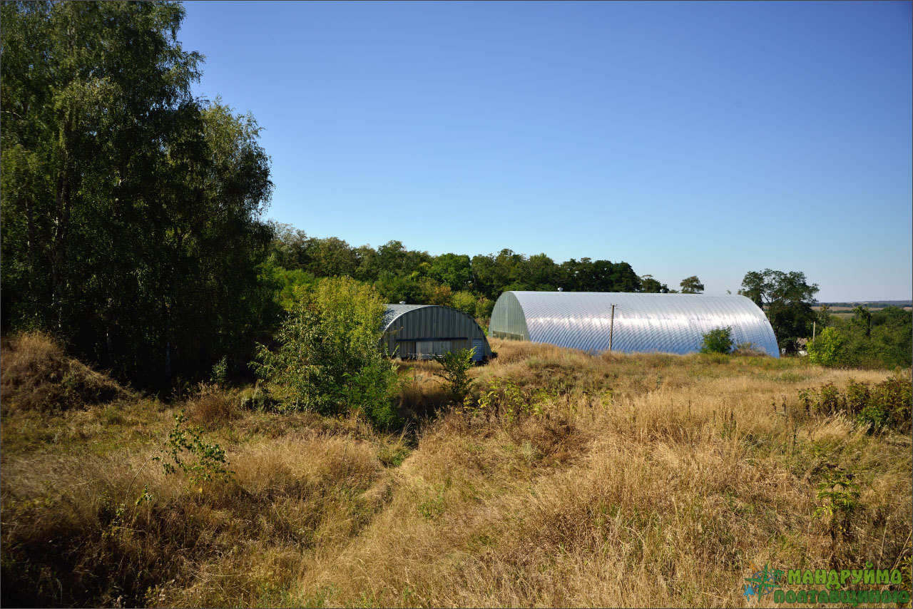 Гінцівська стоянка (поселення) пізнього палеоліту. Кам’яний вік, близько XIII-XV тисяч років тому, Гінці, між селами Гінці і Духове, правий берег річки Удай, 1-2 км від II русла